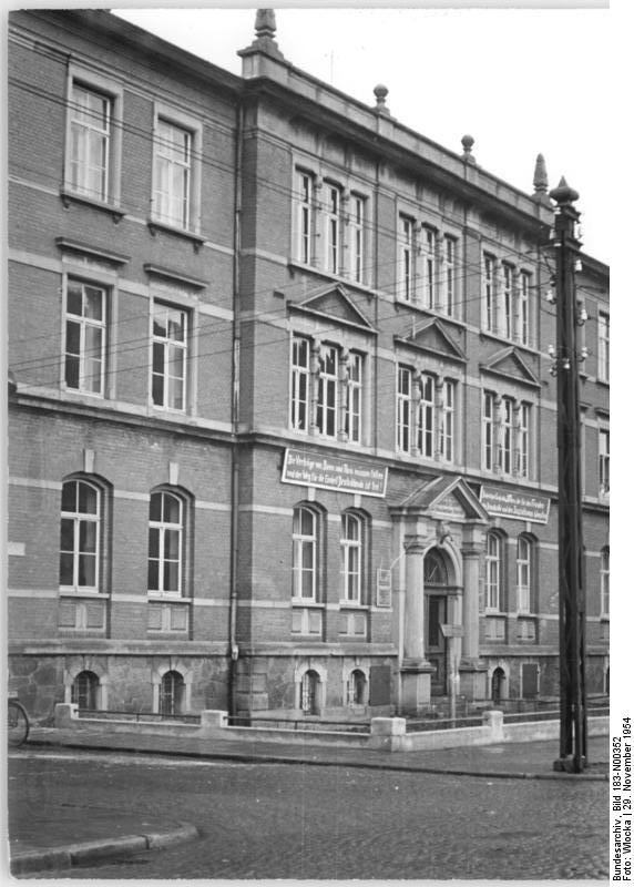 Ilmenau, Hochschule für Elektrotechnik Zentralbild TBD-Wlocka-29.11.1954, Film-Nr. 754 Stimmungsbilder von Ilmenau. Bild 6: Das alte Gebäude der Hochschule für Elektrotechnik in Ilmenaus. Information added by Wikimedia users. Vgl. Bild von 2006